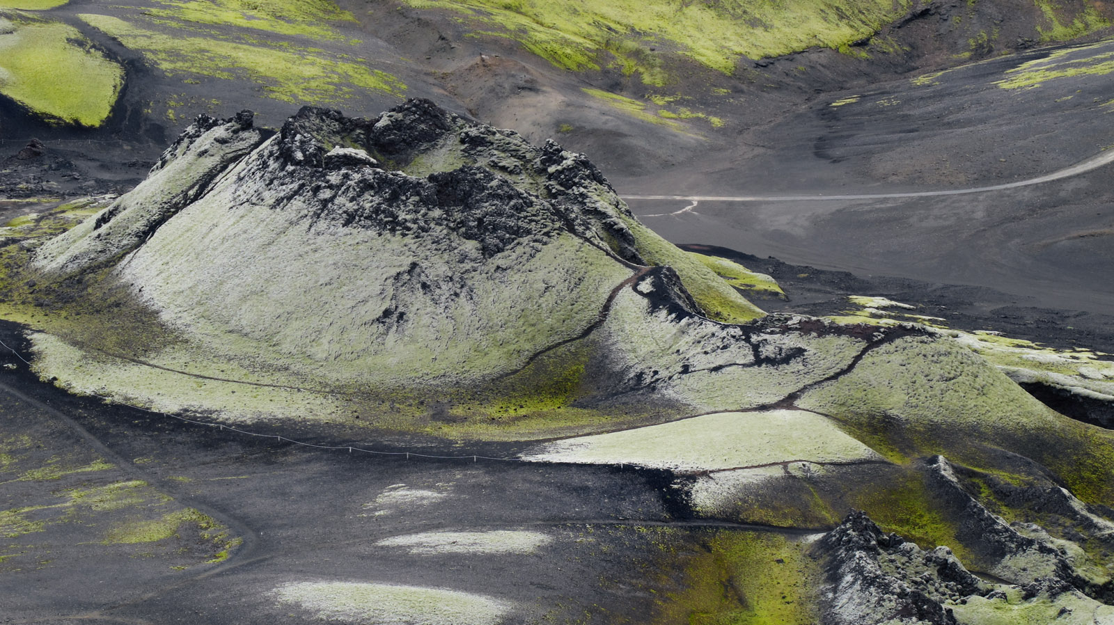 Lakagígar, Laki Krater in Iceland in 2010